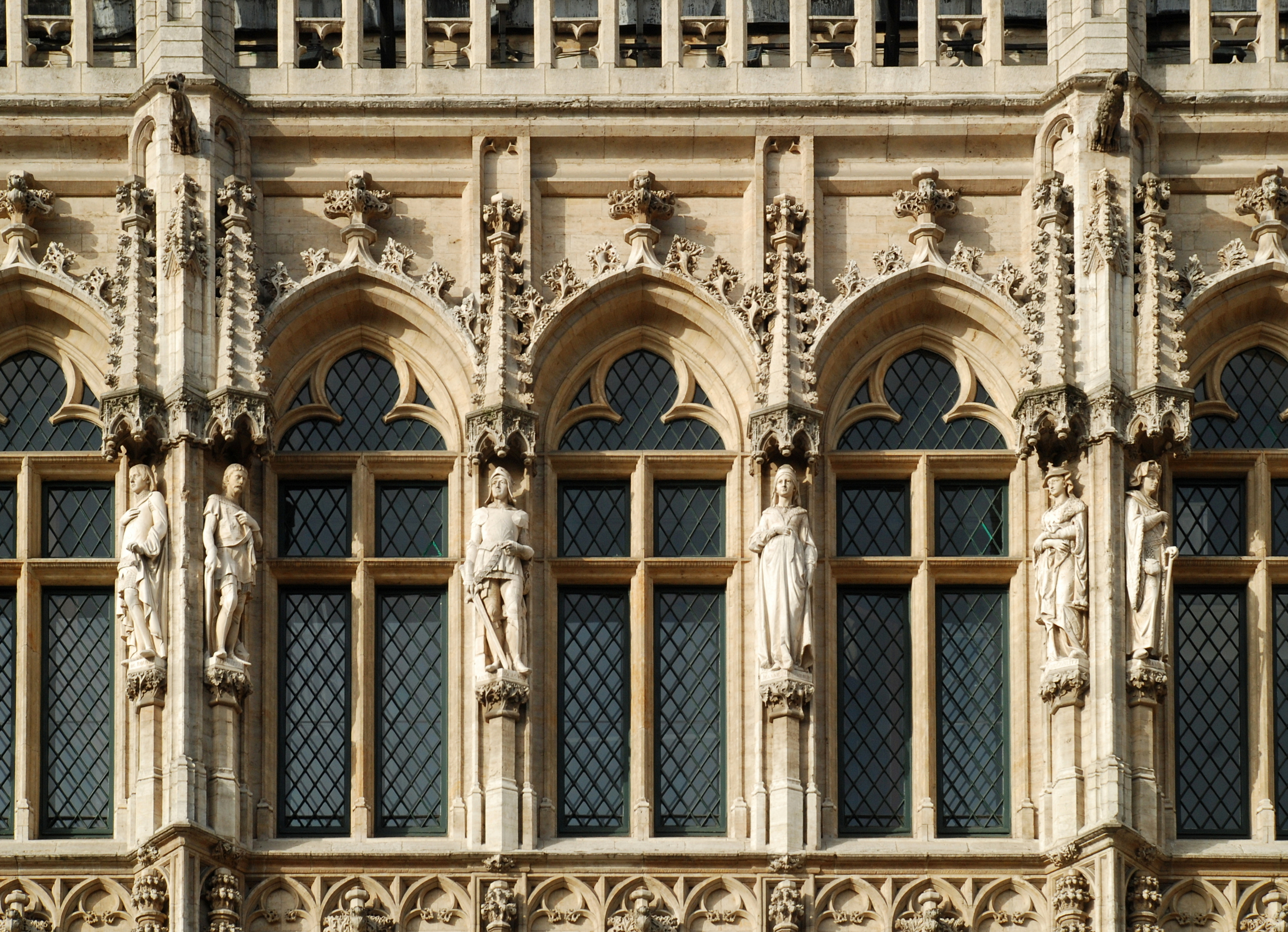 Belgique - Bruxelles - Hôtel de ville de Bruxelles ? De Rouvre Philippe ? Antoine Bourgogne ? Jeanne de ? ? de Gorlitz Jean ?